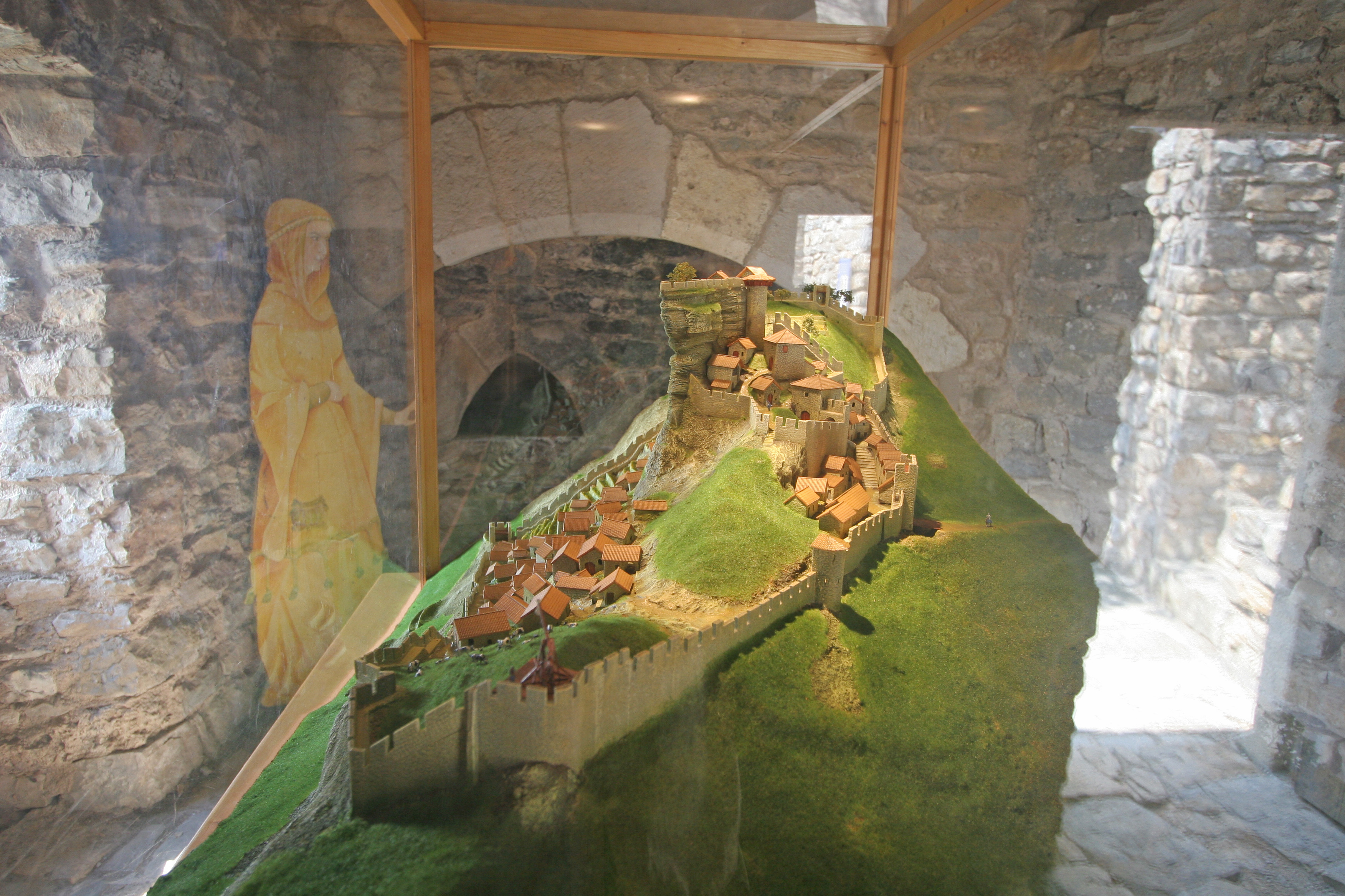 Château de Peyrelade model hradu